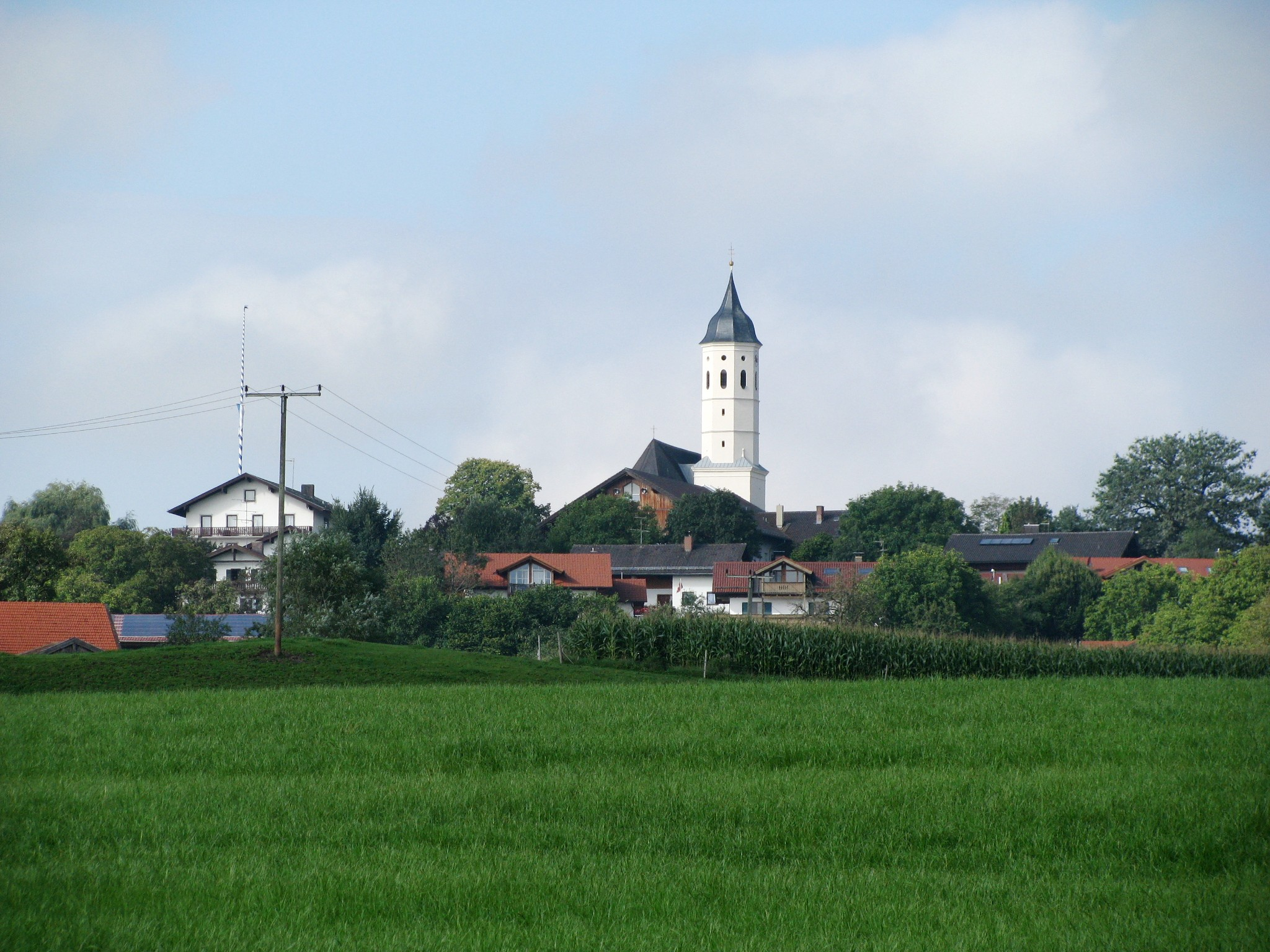 Großhöhenrain von Osten This is a photograph of an architectural monument.